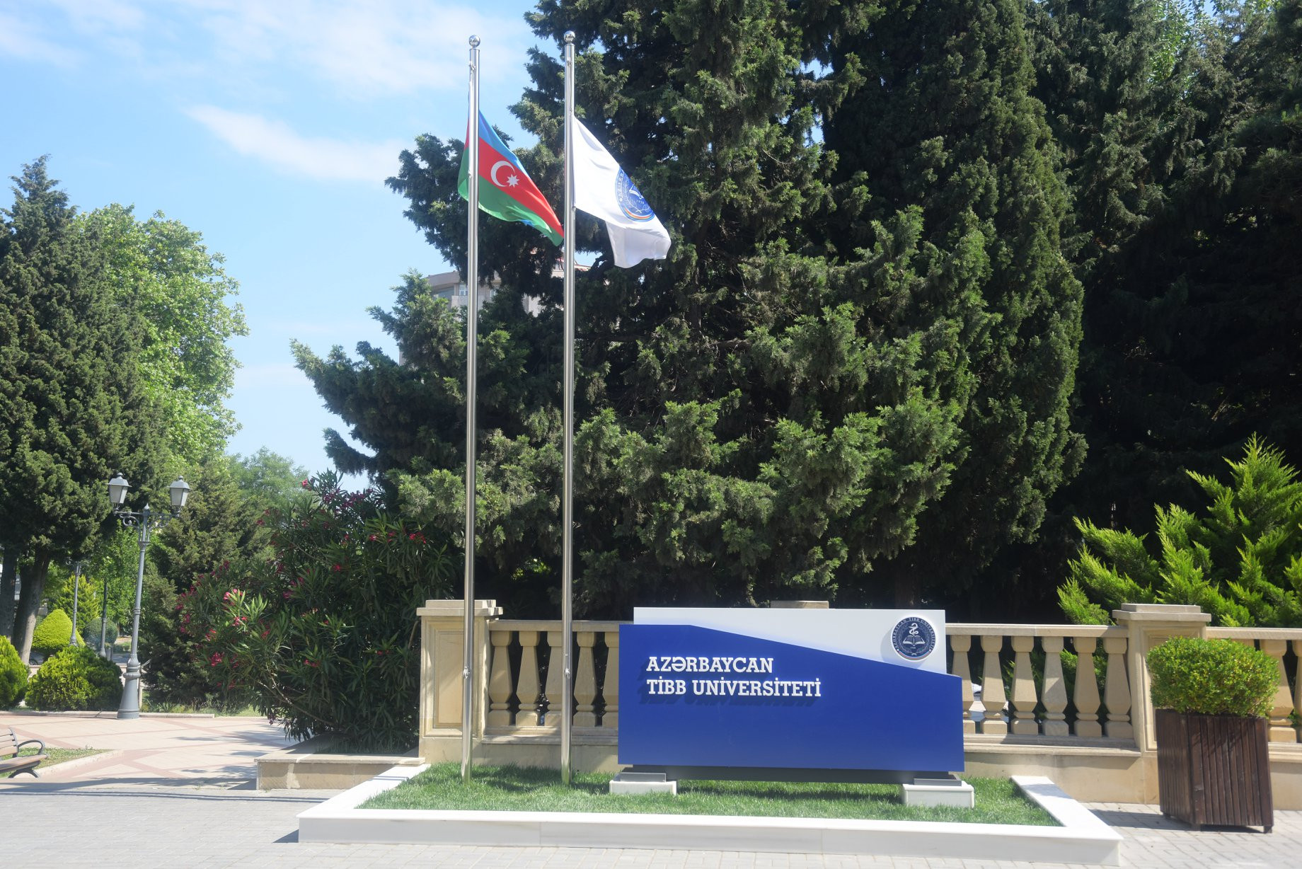 tibbunidekan